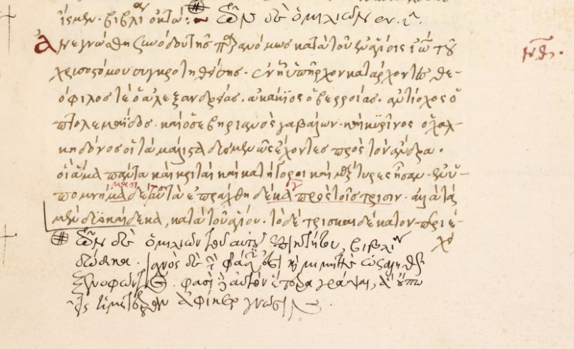 Рукопись XVI века. Фотий I (патриарх Константинопольский). Мириобиблион. Кодекс . 59. Постановления собора в Сиде против мессалиан. Британская библиотека.